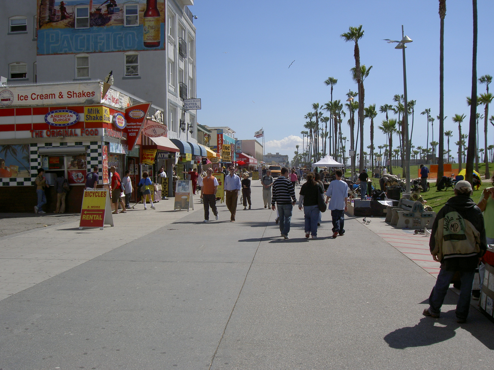 Venice Beach promenade in Venice, Los Angeles.